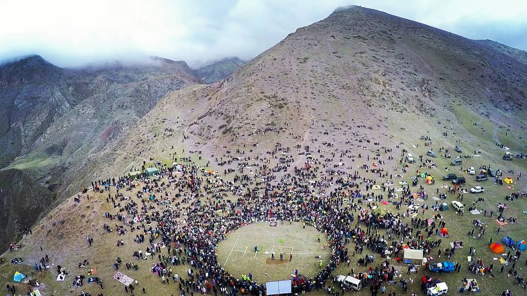 تصویر هوایی از مراسم داغچیلار بایرامی سال ۱۳۹۷